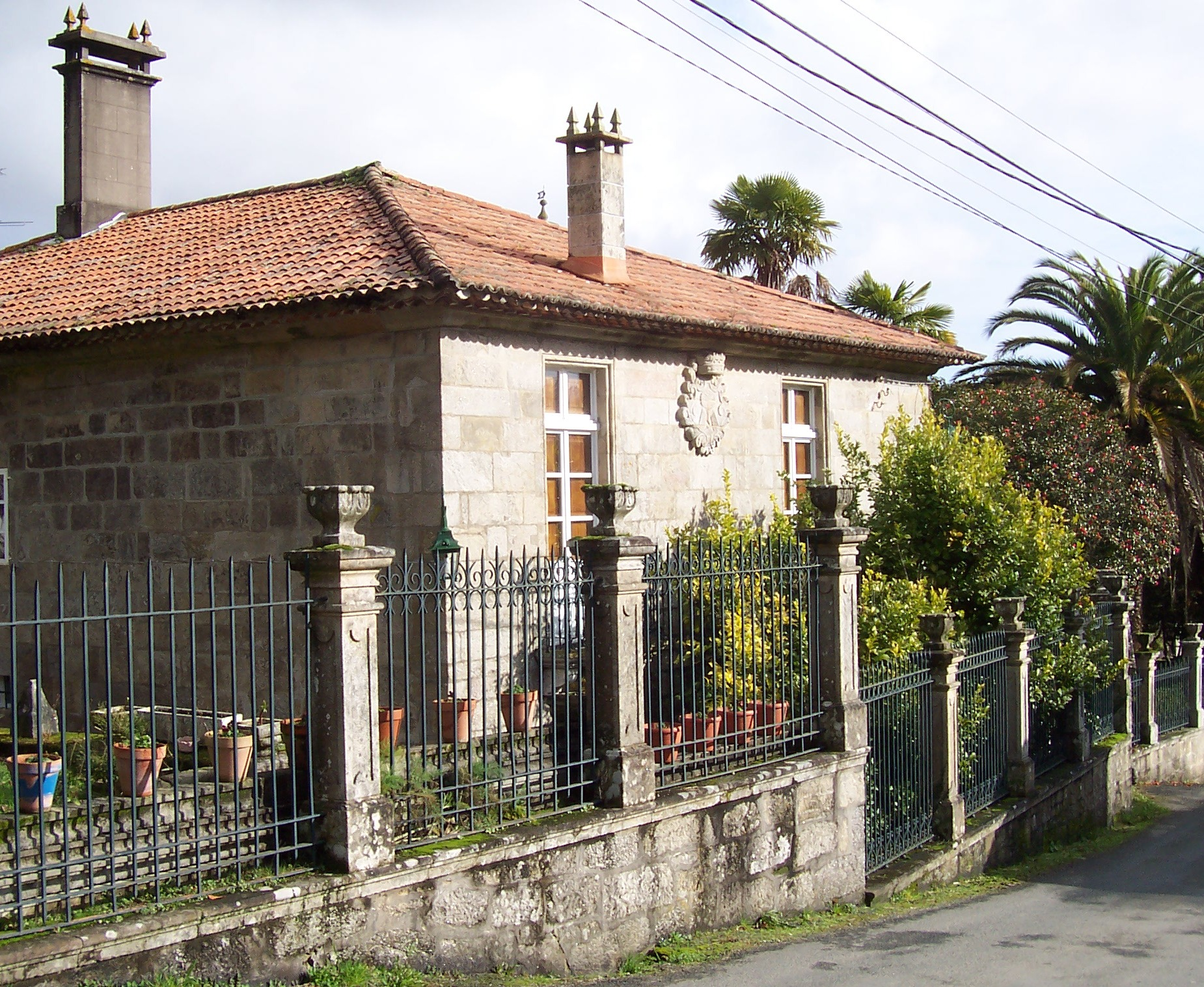 Pazo de Leboráns, Trasmonte, Ames